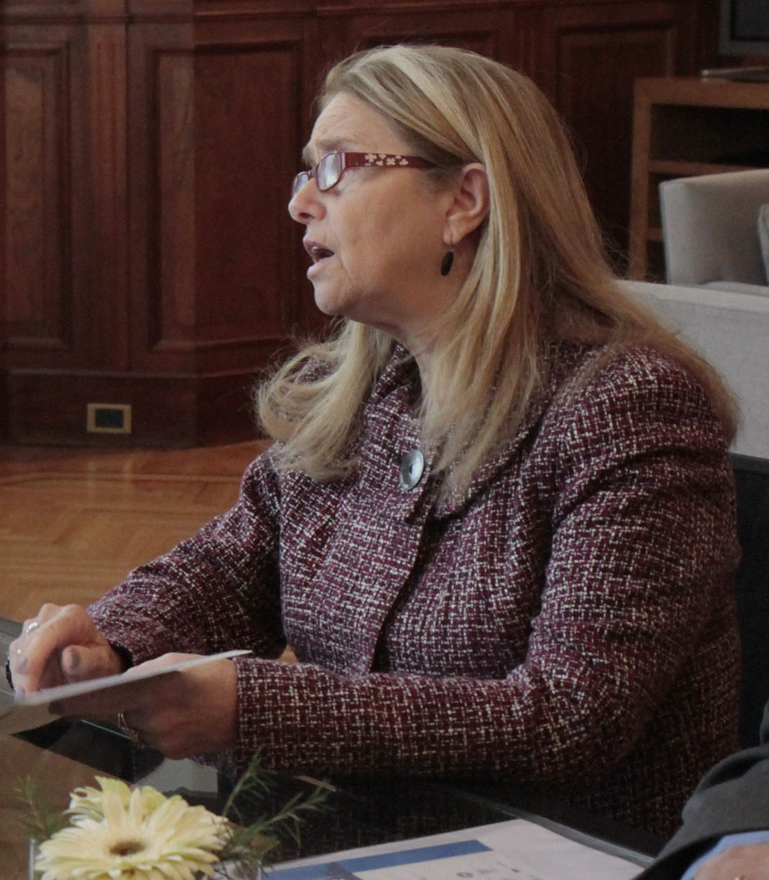 Buenos Aires. Setiembre 3 de 2012. El Jefe de Gobierno porteño, Mauricio Macri, recibe en su despacho del Palacio de Gobierno a la embajadora de Israel, Dorit Shavit, en la mañana de hoy.- Foto Mariana Sapriza-gv/GCBA.